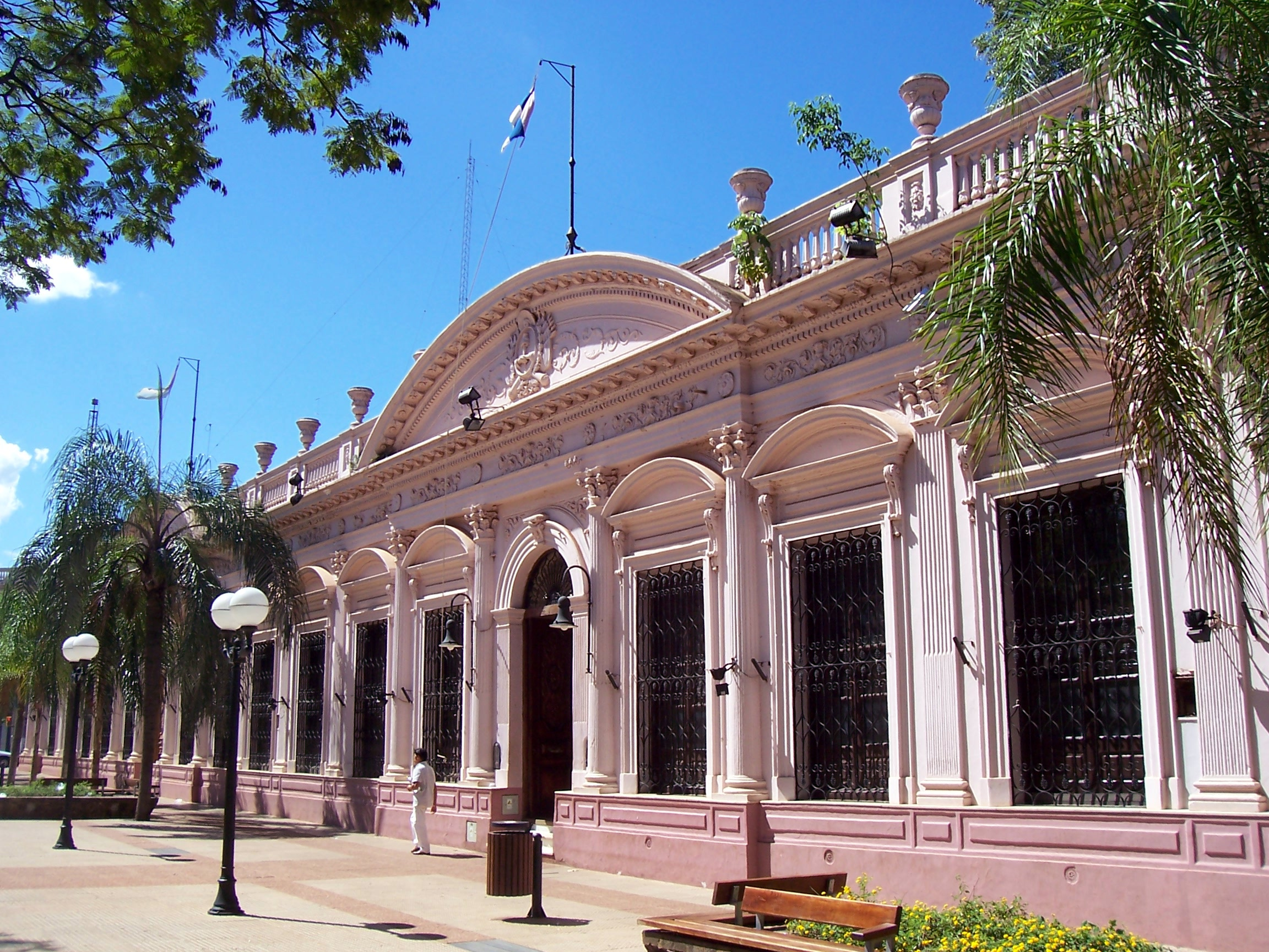 Casa de Gobierno de Misiones